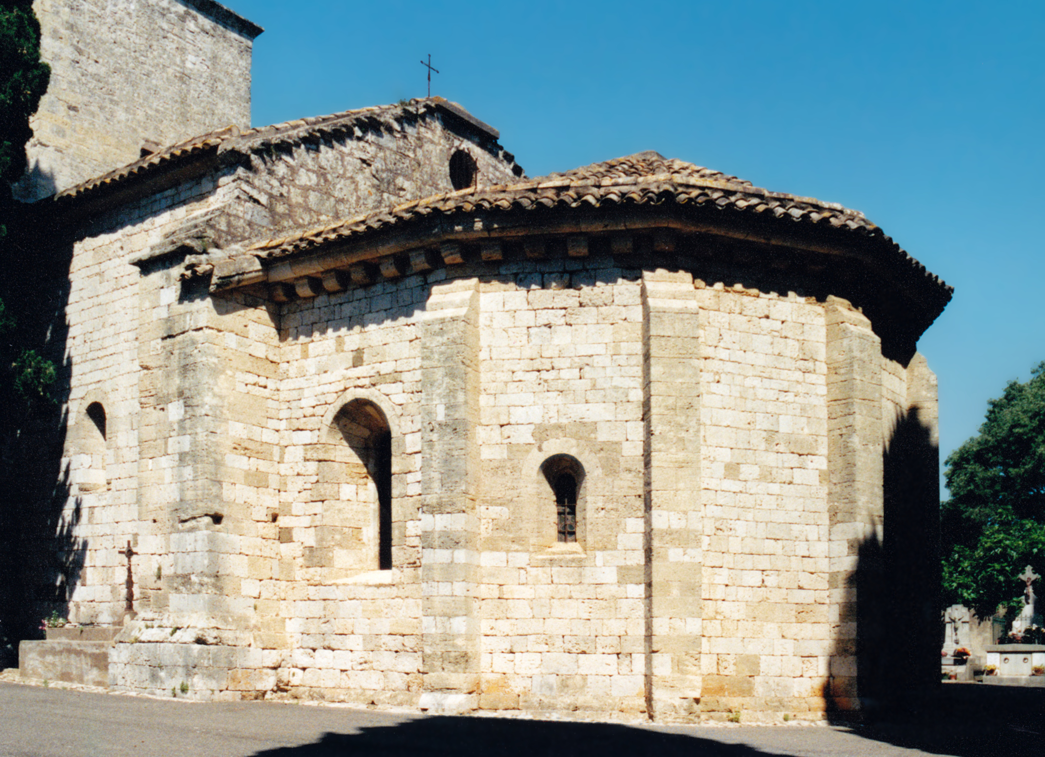 France - Languedoc - Hérault - Paulhan - Église Notre-Dame-des-Vertus